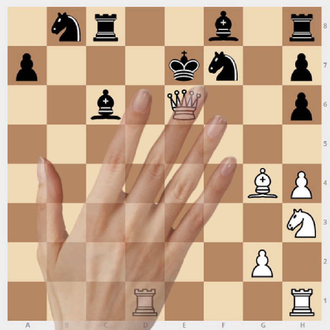 Le sorelle della pittrice Lucia, Minerva e Europa Anguissola giocano a scacchi. Реконструкция позиции на картине Софонисбы Ангвиссолы.